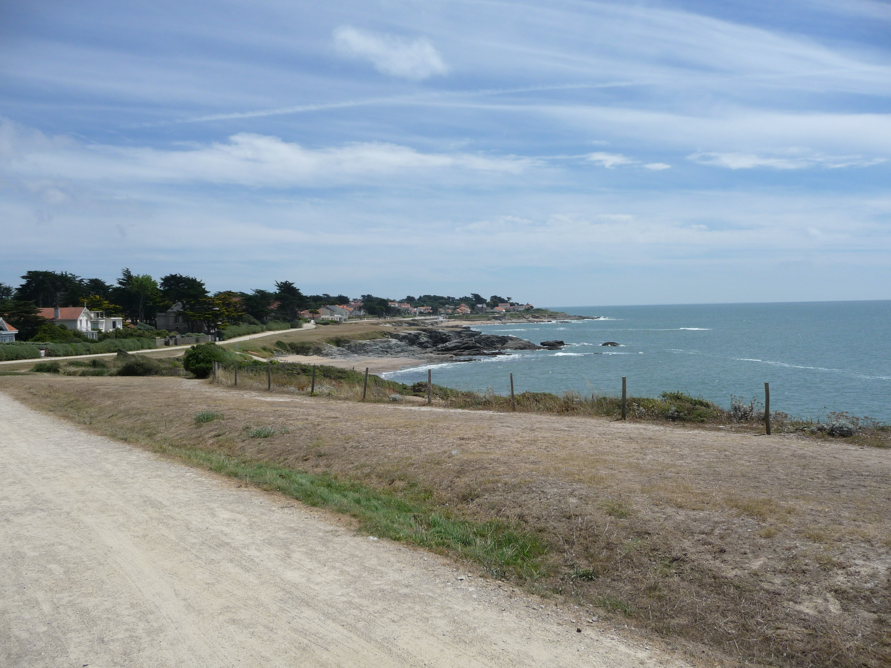 Préfailles, corniche de la Hutte, 2010